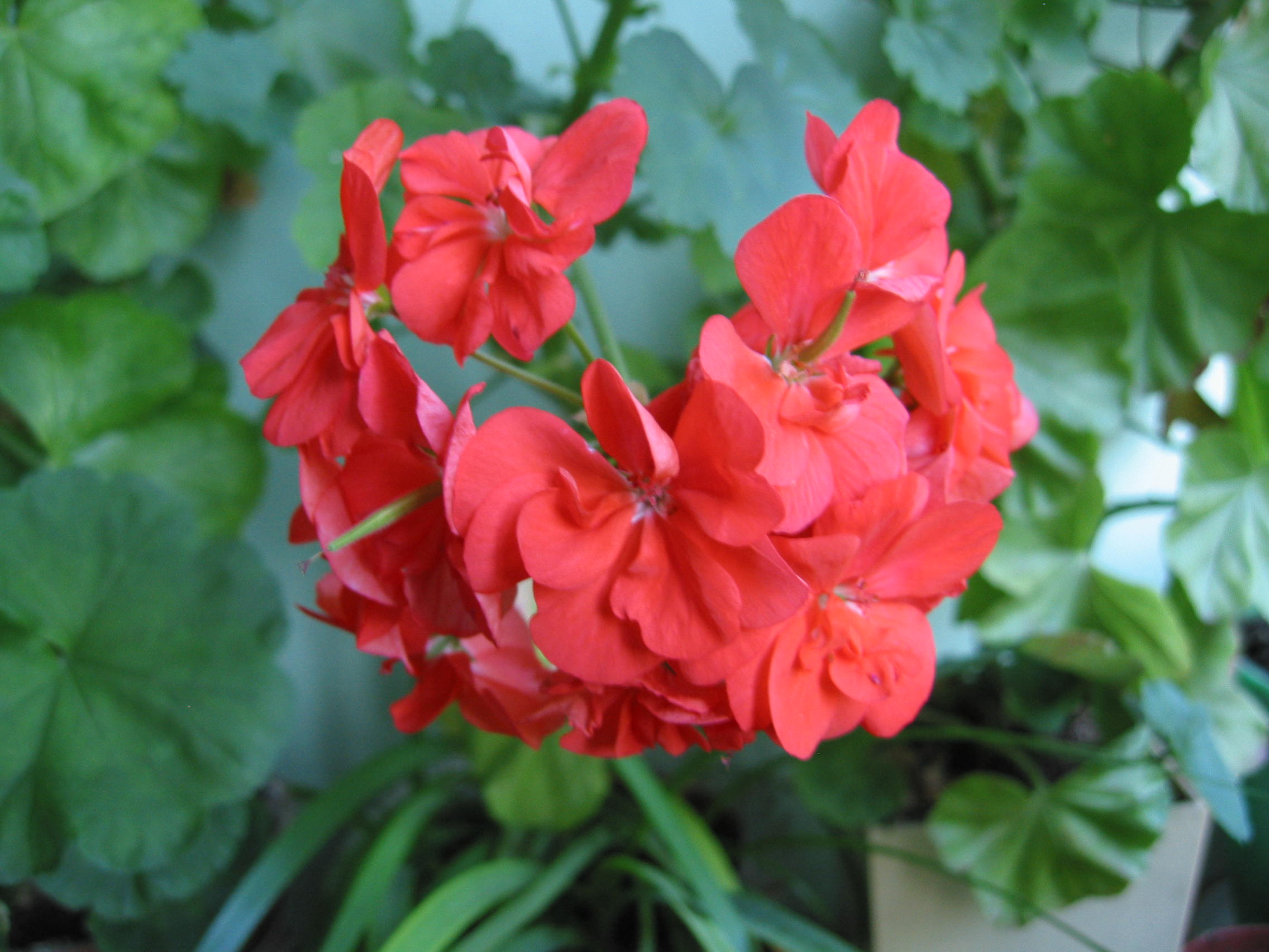 Растение